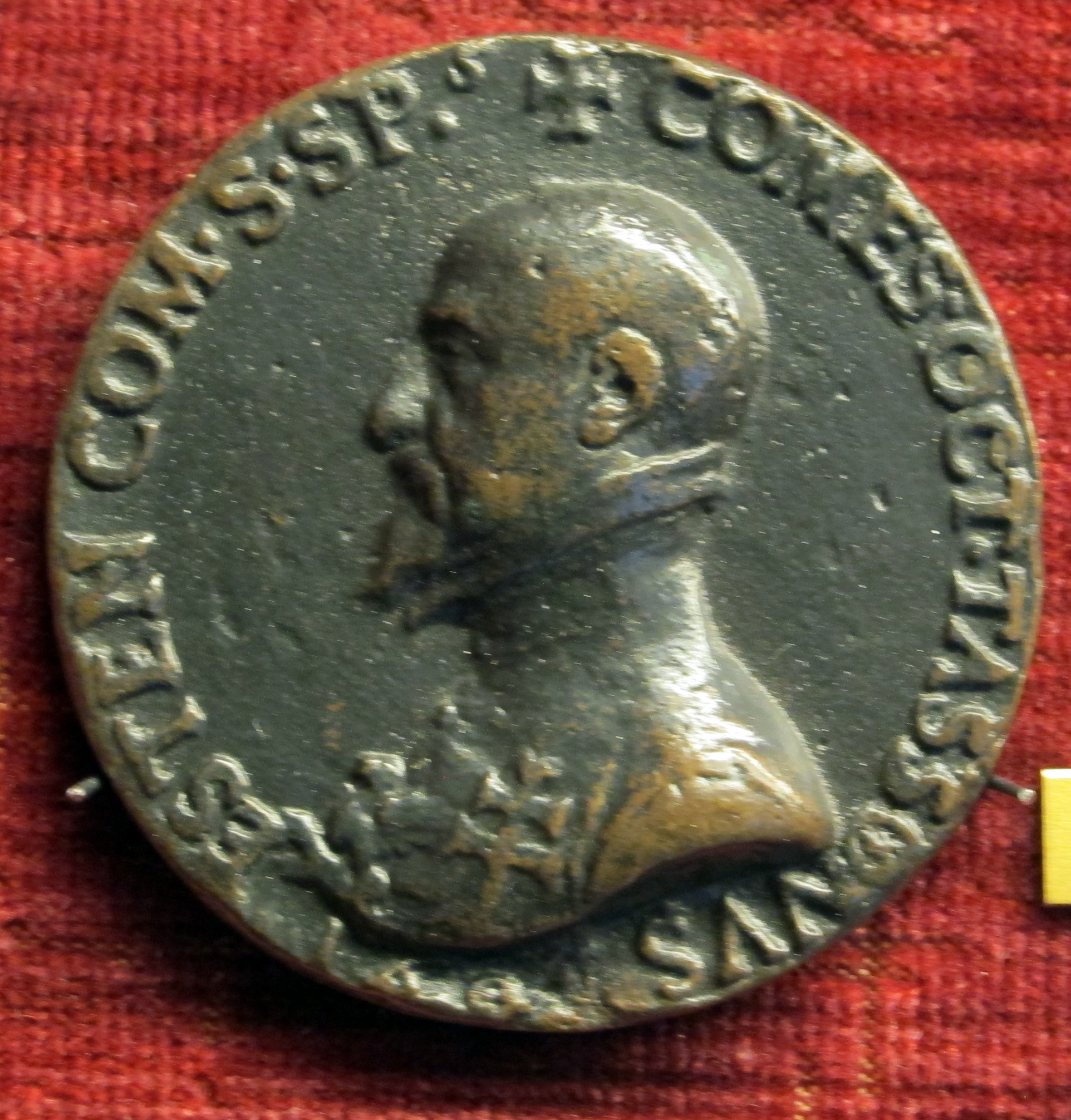 medaglia, vedi titolo